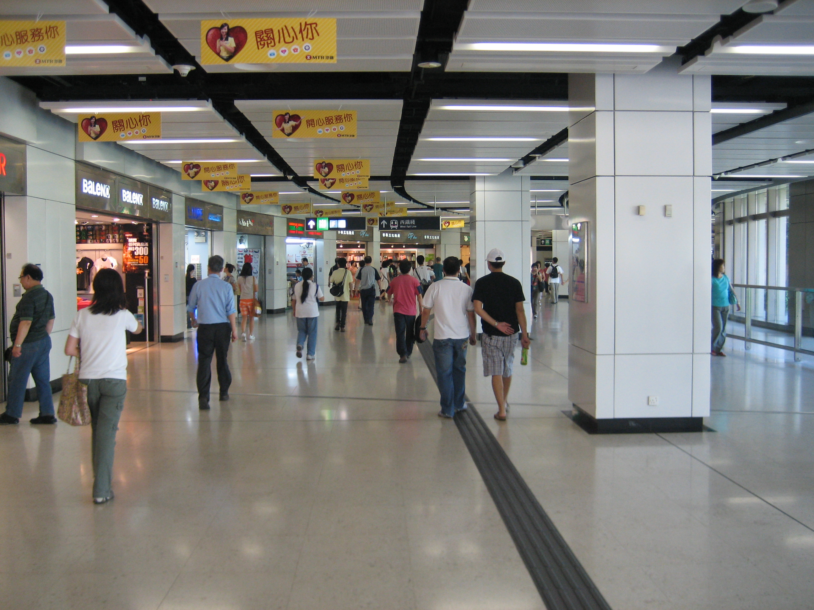 美孚站的走廊